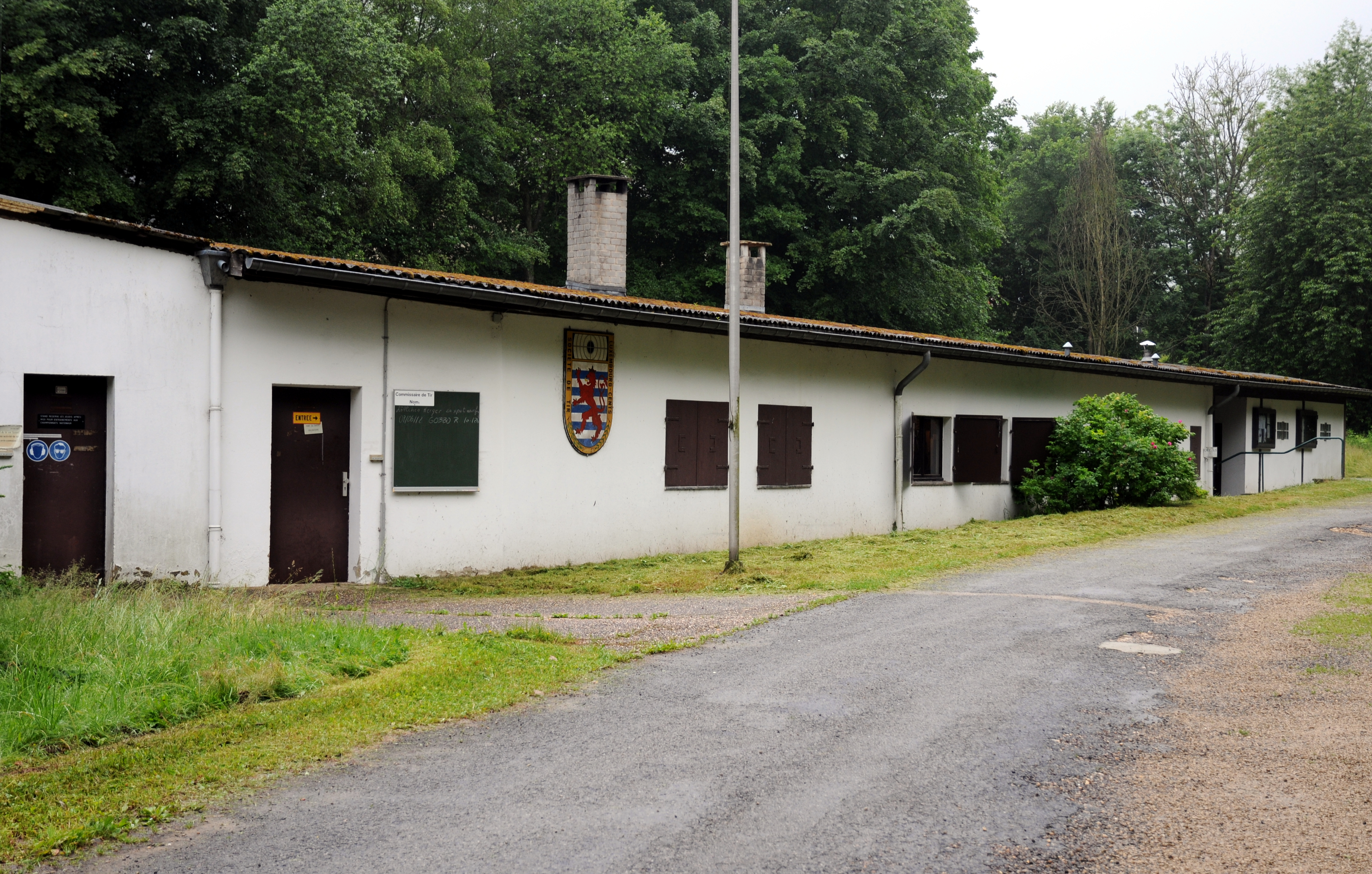 De fréiere Schéissstand vum Schéissclub Lëtzebuerg-Cents Op de Steekaulen um Sennengerbierg.